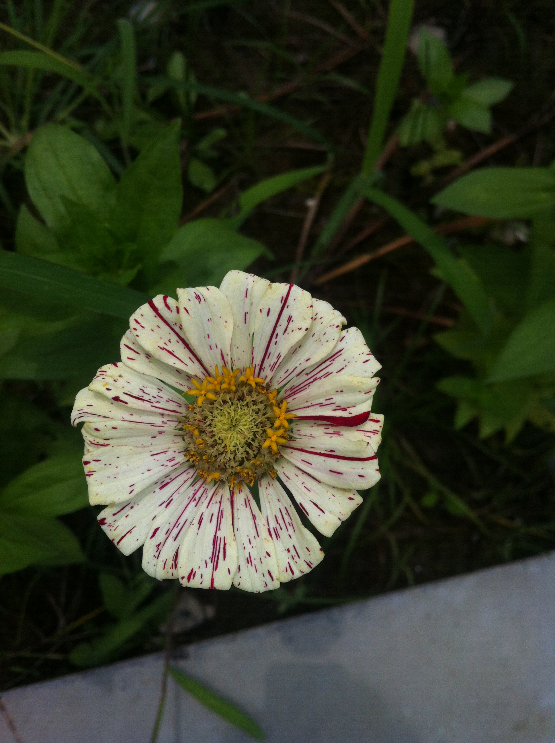 Pepermint White